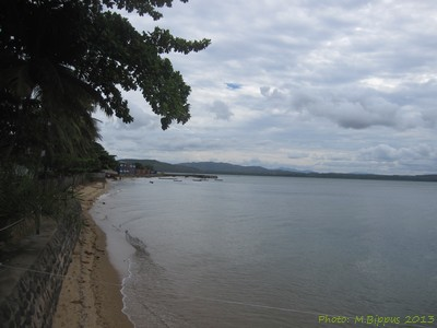 Vohemar, plage et le port